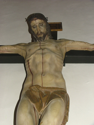 Cristo Crucificado, realizado por Antonio Cano en 1939 y donado a la iglesia de su pueblo, Guájar Faragüit (Granada).